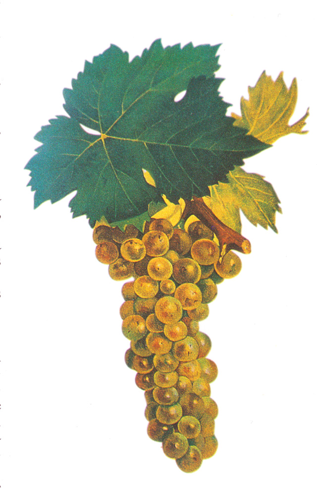 Grappe de Muscat blanc à petits grains par Viala et Vermorel